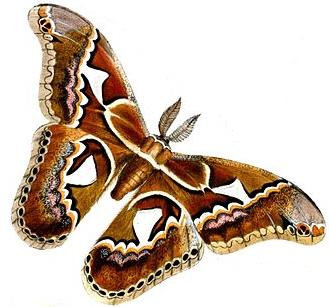 (center) S[aturnia] Orizaba = Rothschildia orizaba orizaba (Westwood, 1853), ♂